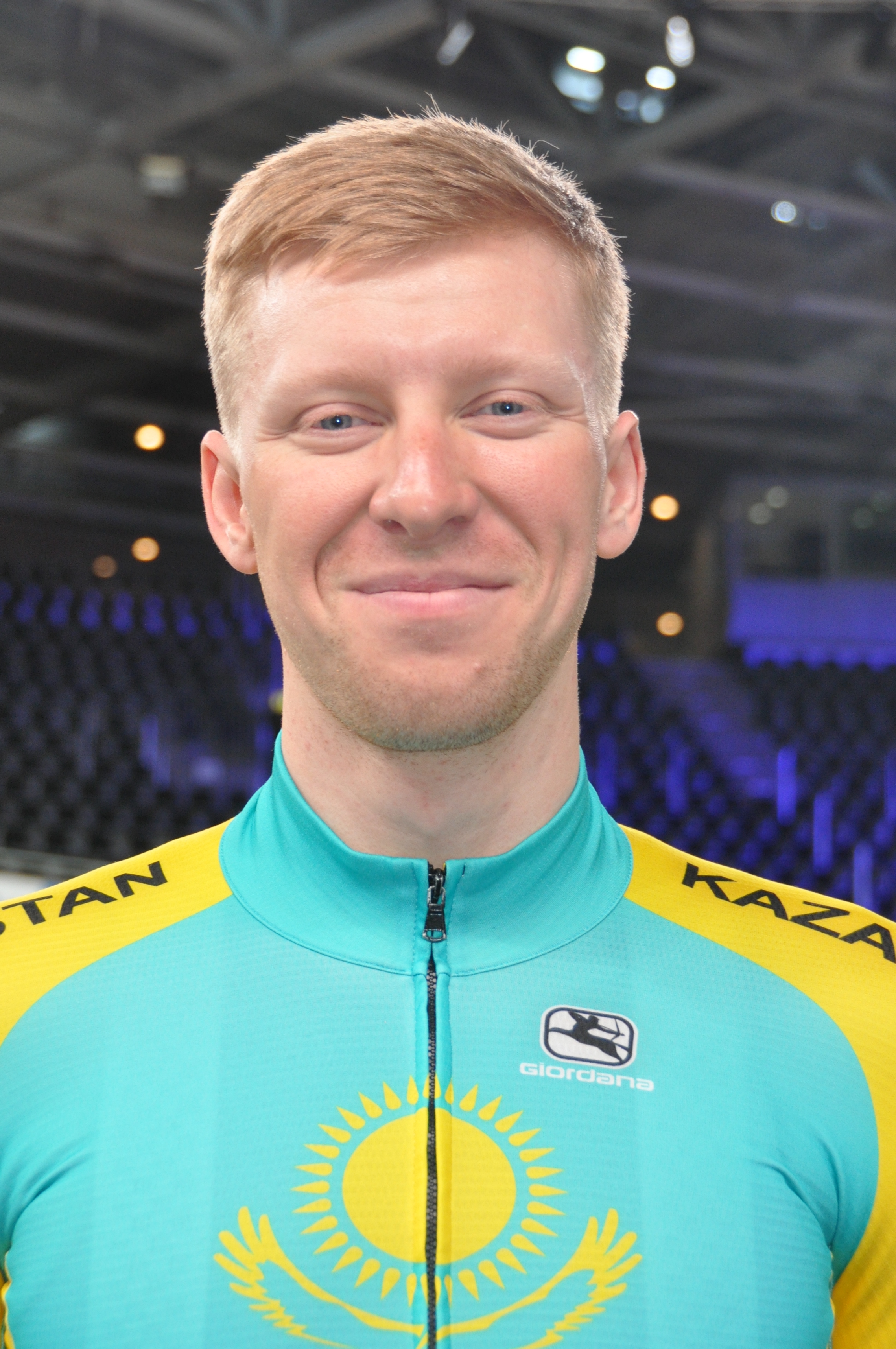 Roman Vassilenkov, Radsportler aus Kasachstan